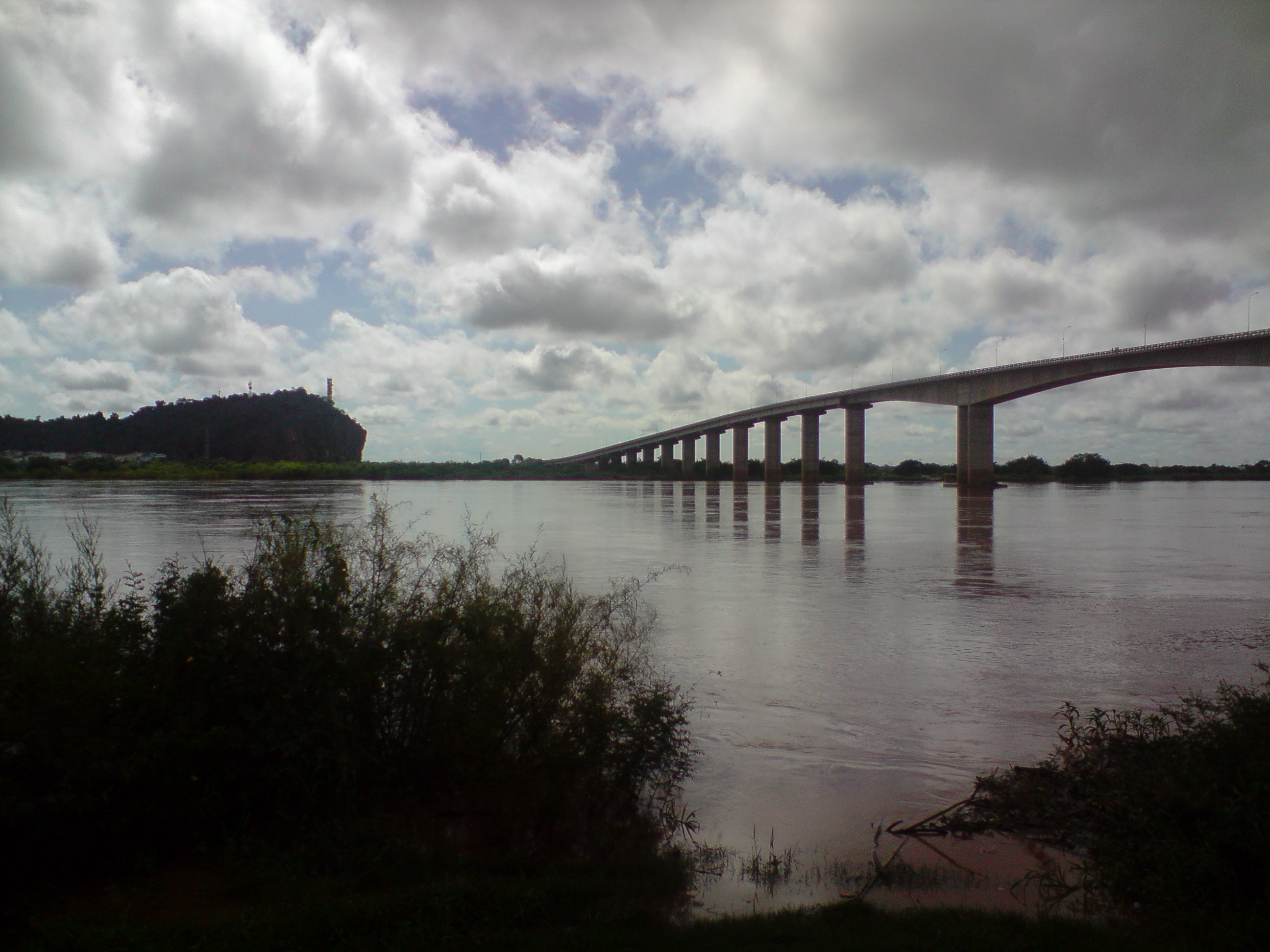 Ponte Gercino Coelho, em Bom Jesus da Lapa, Bahia, Brazil, sobre o Rio São Francisco